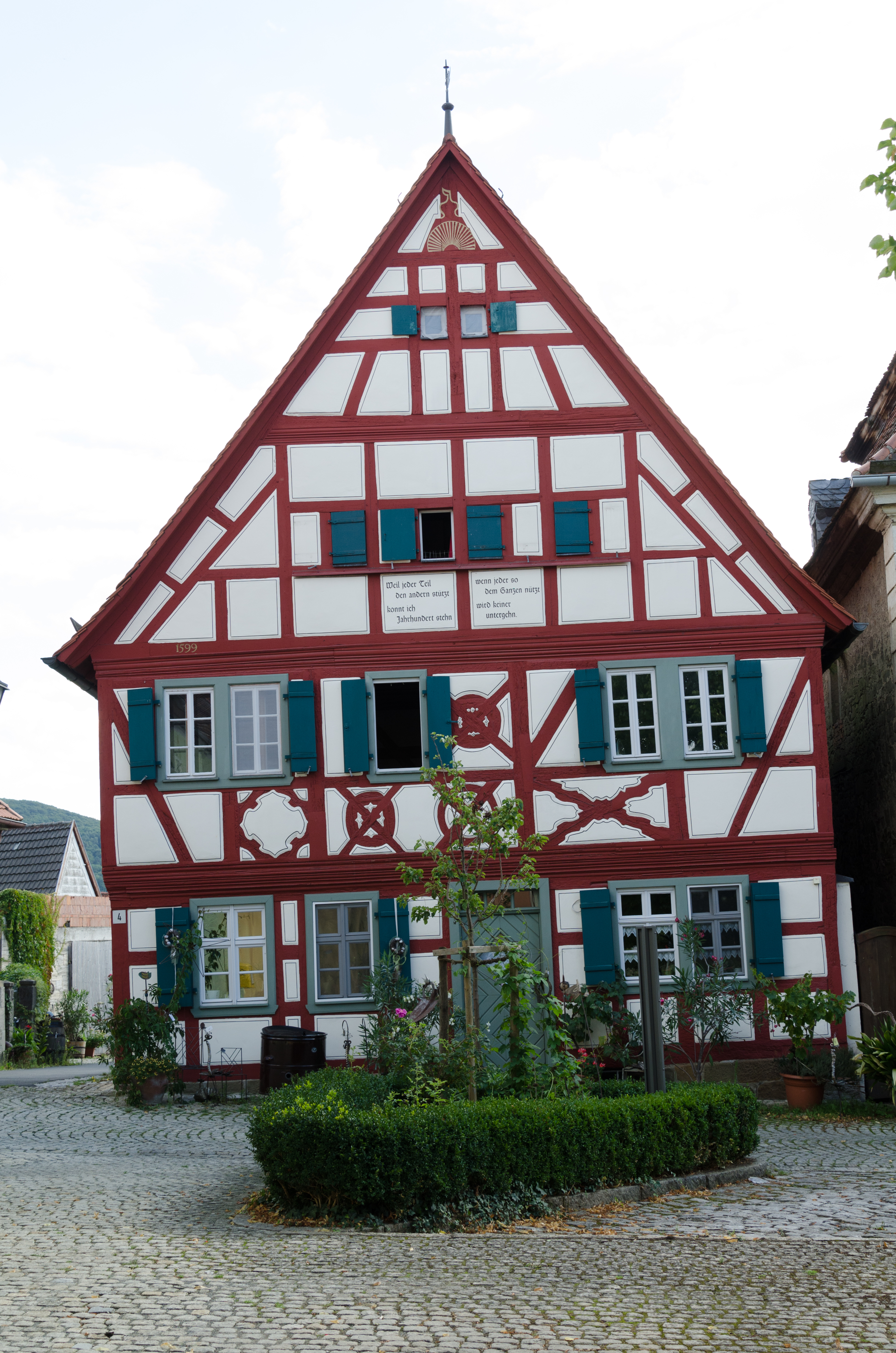 Willanzheim, Hüttenheim 4